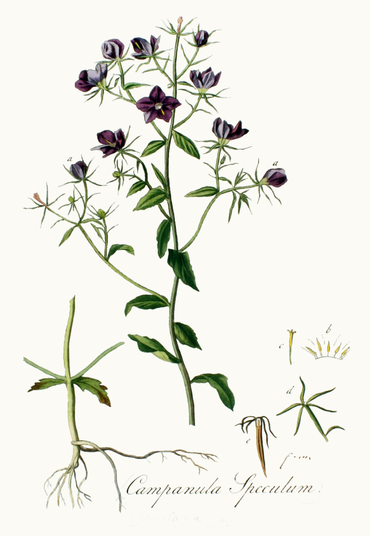 Legousia speculum-veneris (L.) Durande ex Vill. (Syn. Campanula speculum-veneris L.)